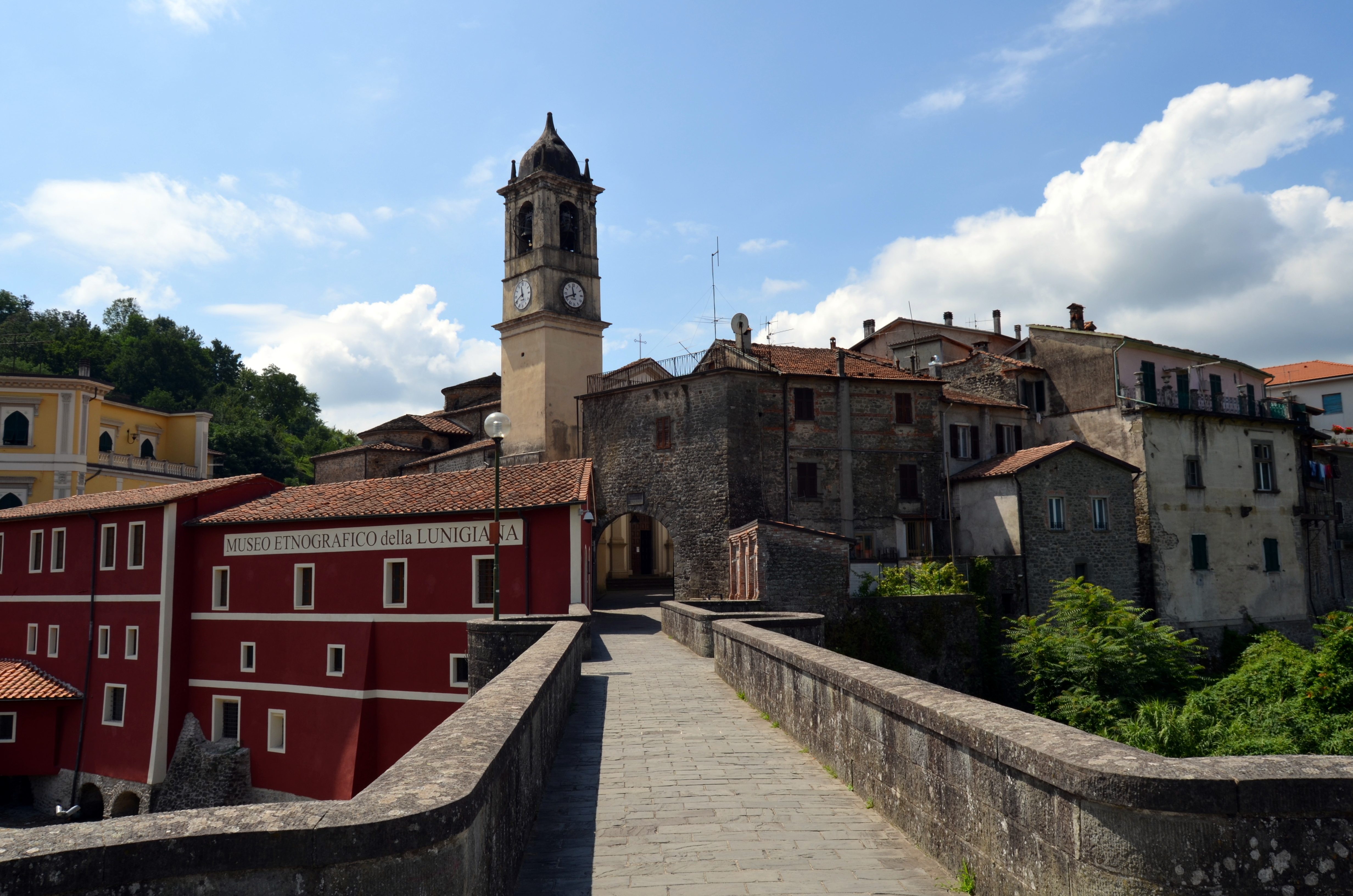 Panorama di Villafranca di Lunigiana, Toscana, Italia